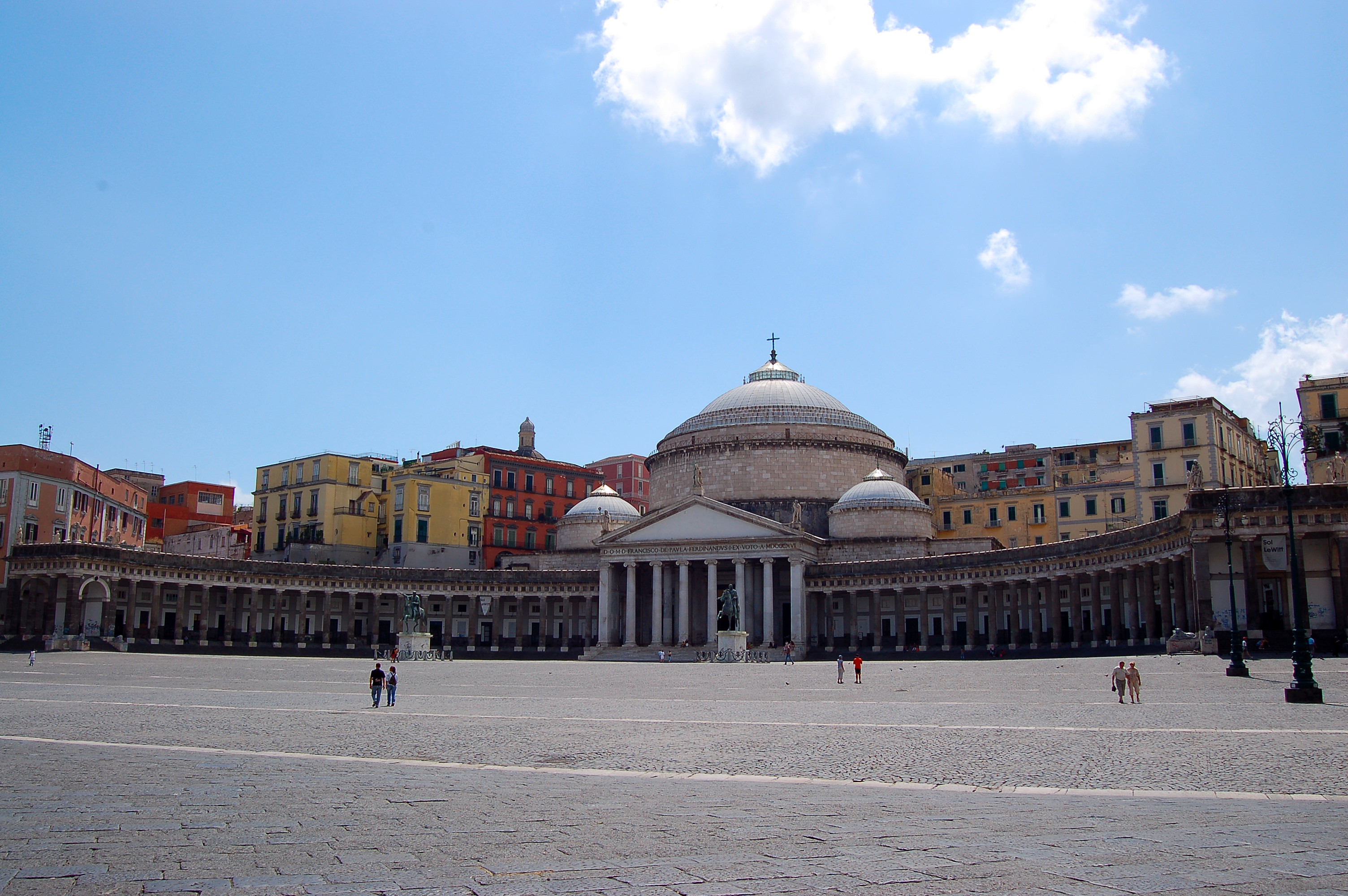 Napoli - Piazza Plebishito